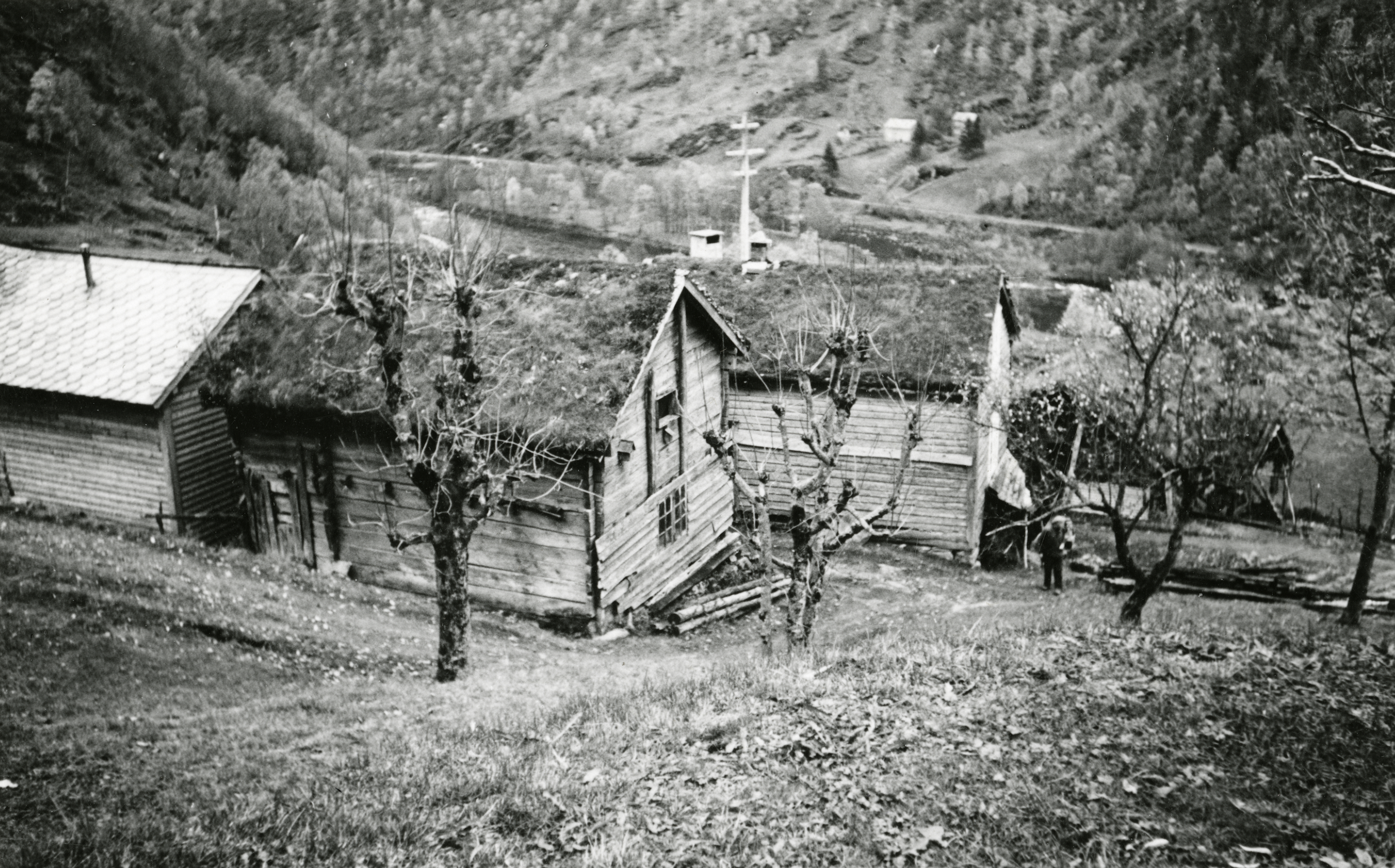 Kvilekvål, Knute Nelson stova i Evanger, Vestland This image on crowdsourcing geotagging platform Fotodugnad